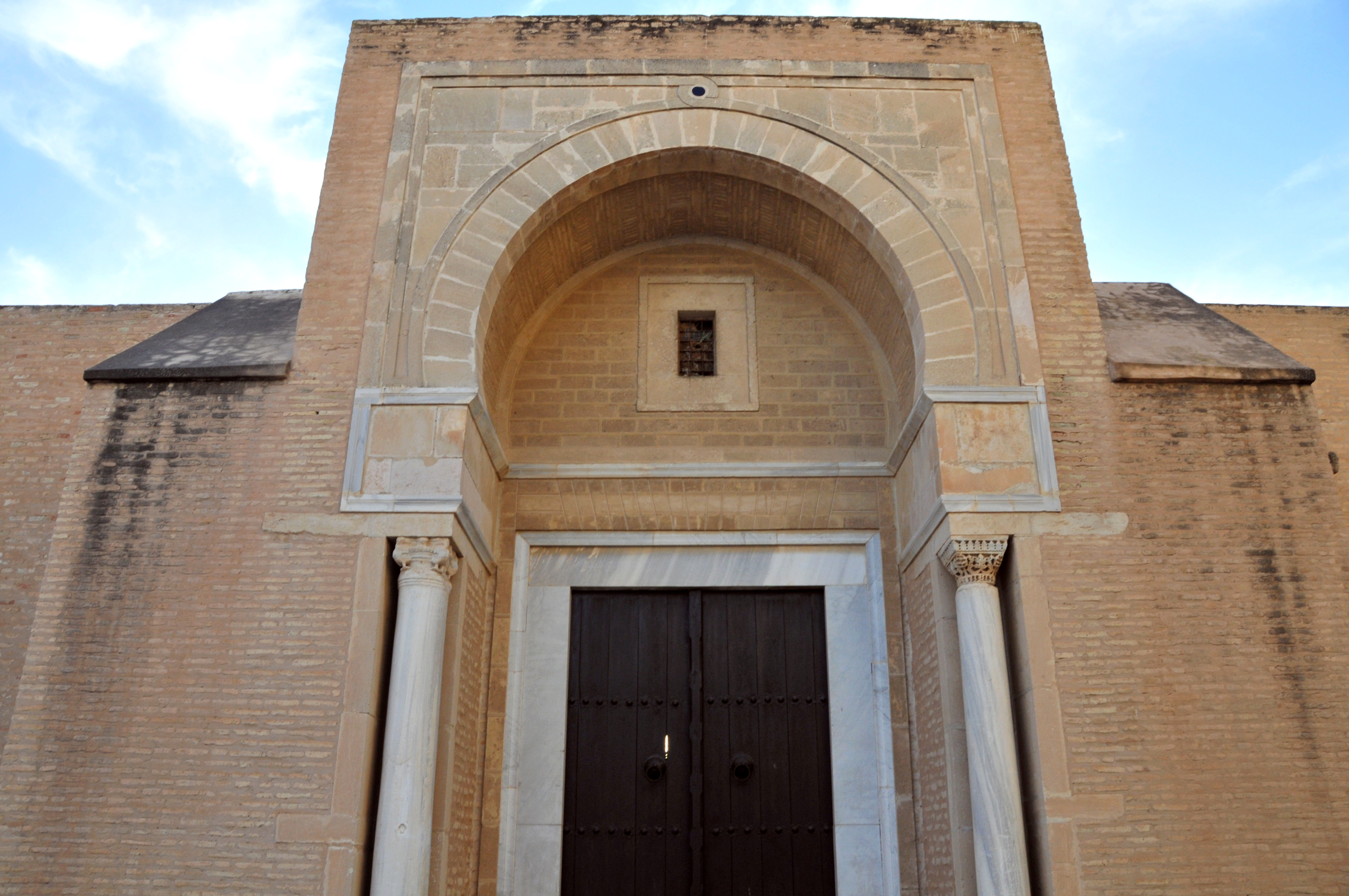 Vue d'une entrée située du côté oriental de l'enceinte de la Grande Mosquée de Kairouan, en Tunisie.